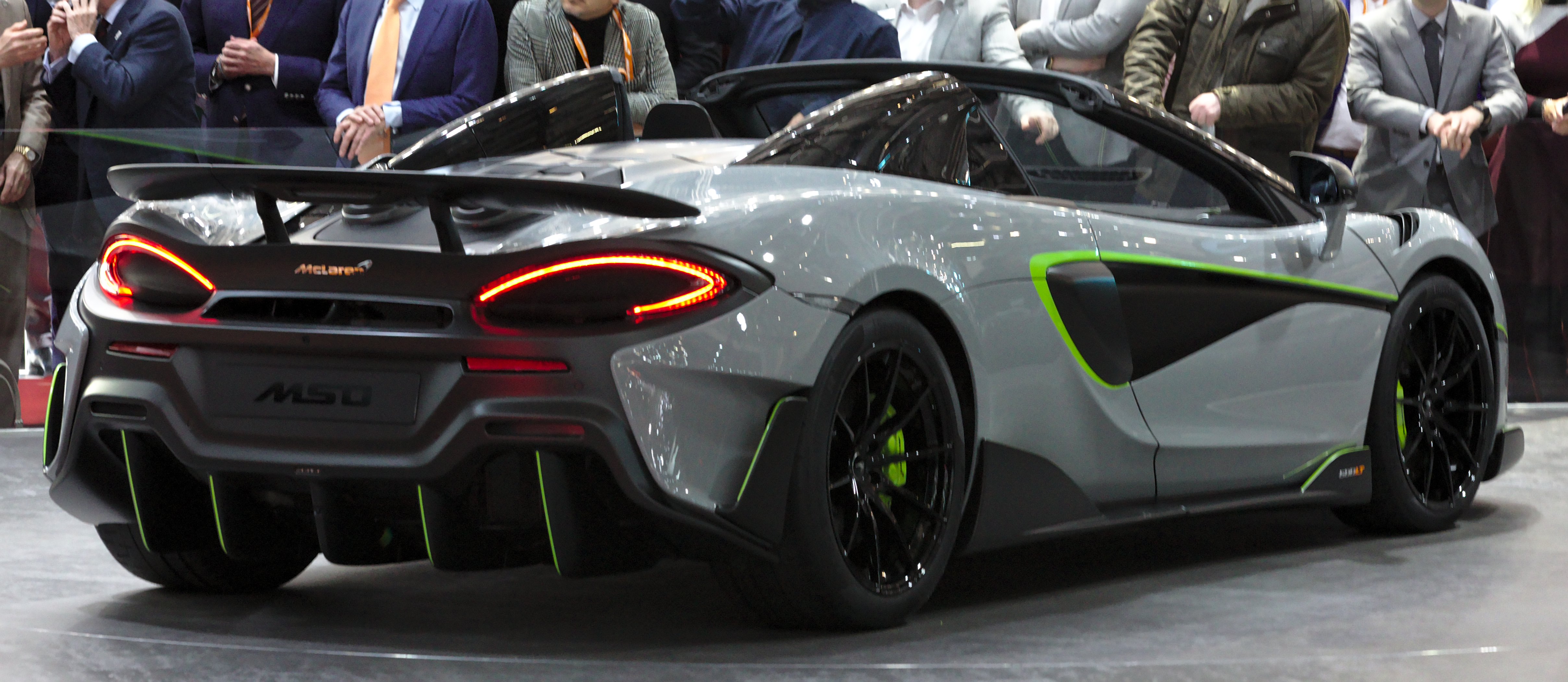 McLaren 600LT Spider MSO at Geneva Motor Show 2019